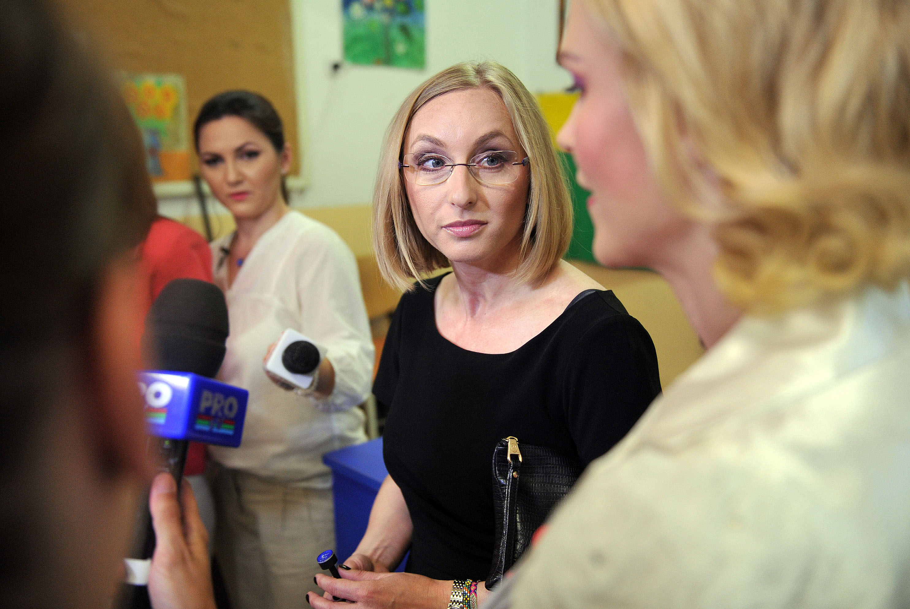 Victor Ponta, Daciana Sarbu, Gabriela Firea, Nicolae Banicioiu si Gabriela Szabo la Buftea 25.05 (2)